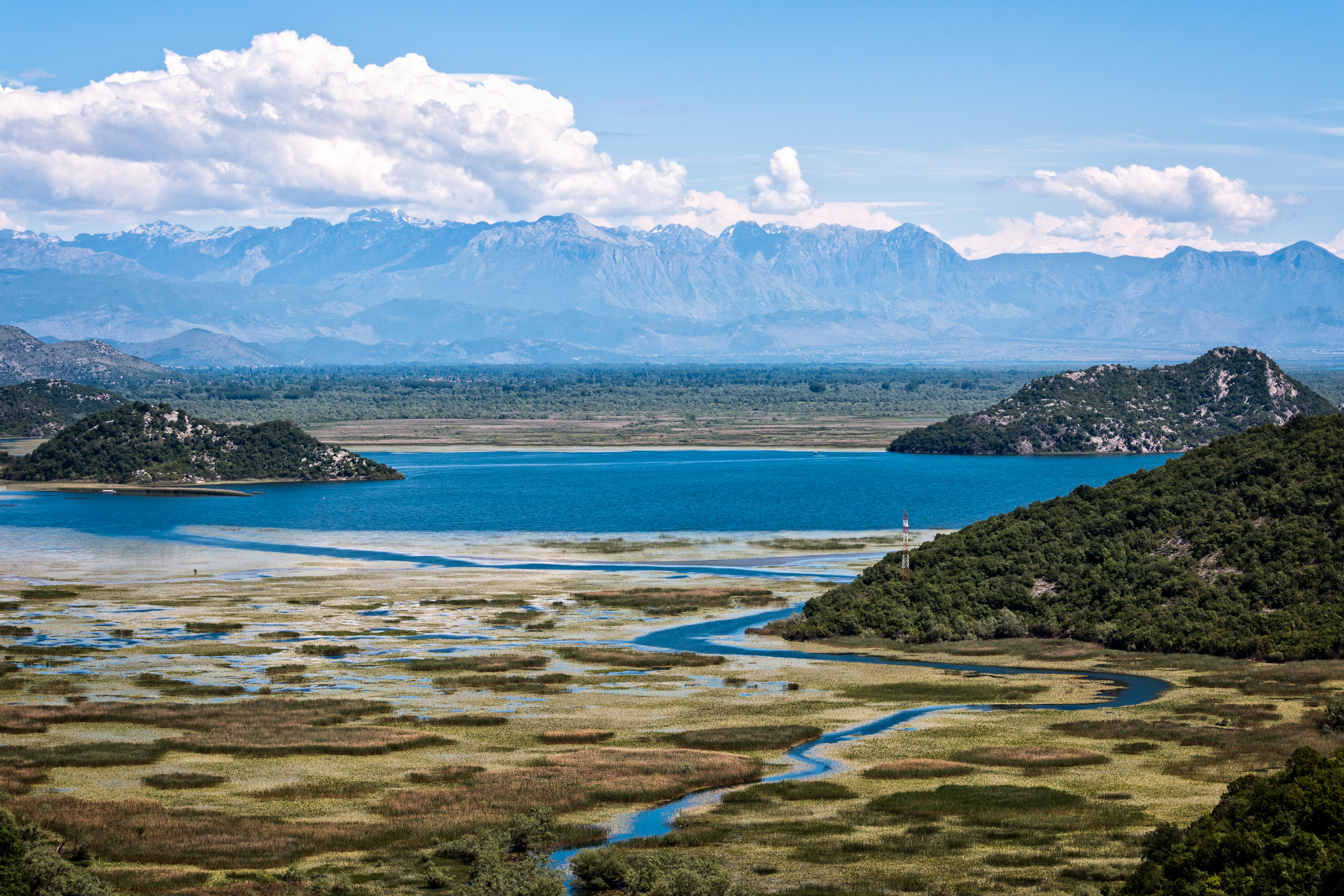 National Park Skadarsko Jezero